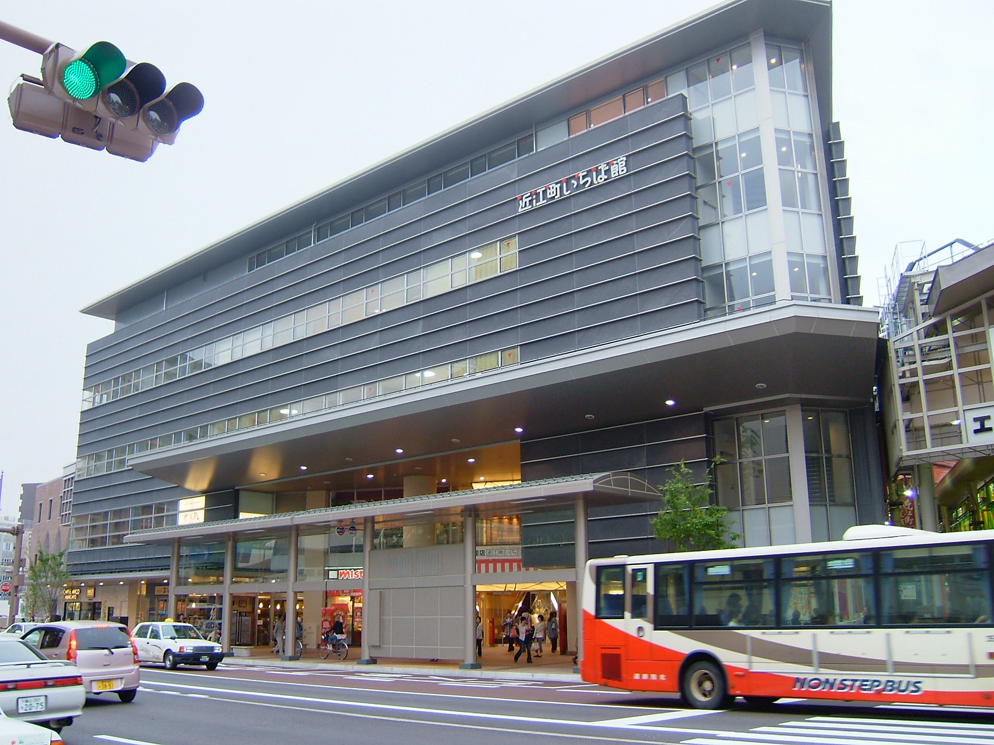 近江町市場の中核店舗「近江町いちば館」